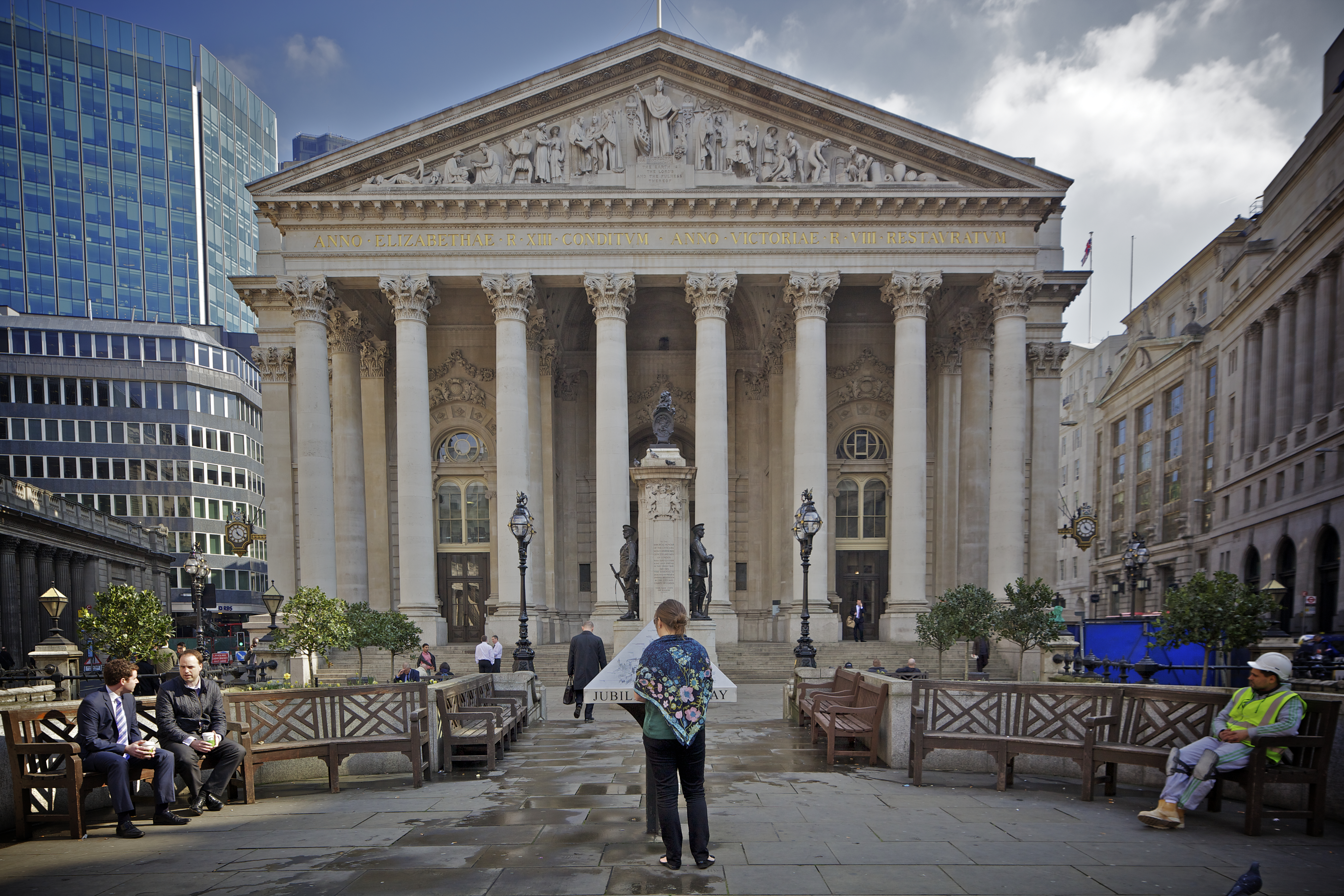 Royal Stock Exchange